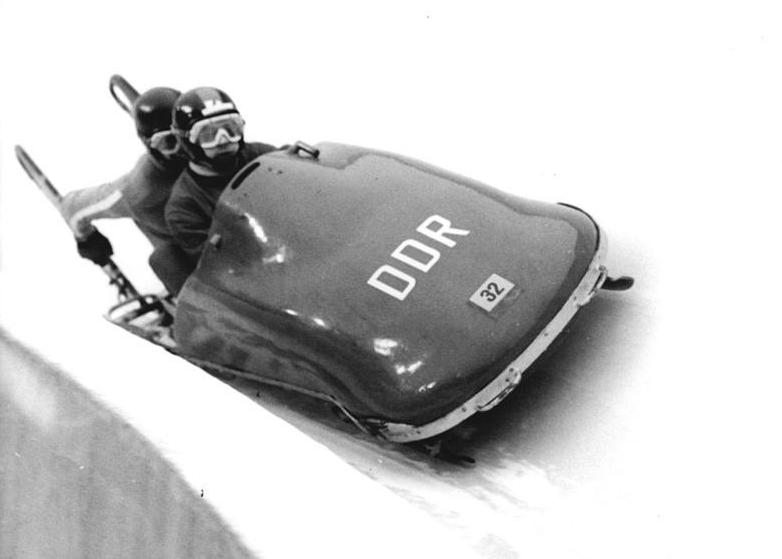 Horst Schönau, Harald Seifert ADN-ZB Schaar 28.12.77 Oberhof: DDR-Meister im Zweierbob wurden am 28.12.77 auf der Oberhofer Kunsteisbahn erneut die Titelverteidiger Horst Schönau und Harald Seifert (ASK Vorwärts Oberhof: mit einer Gesamtzeit von 3:09,68 min für die vier Läufe).